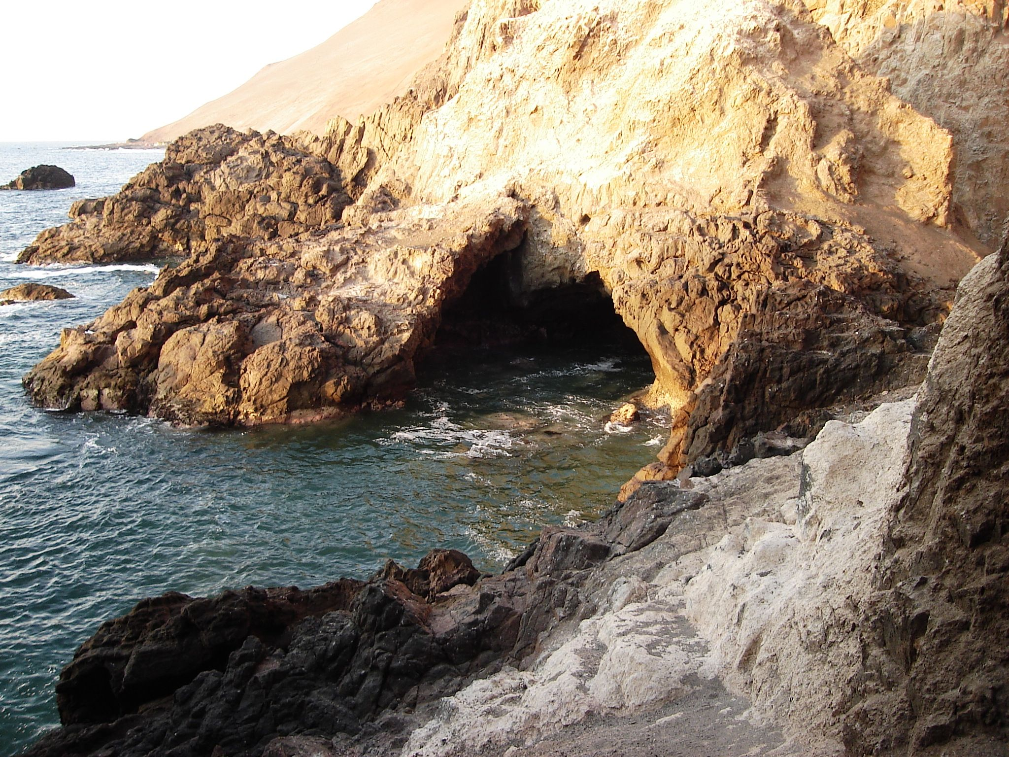 Foto tirada por mim, em Arica.